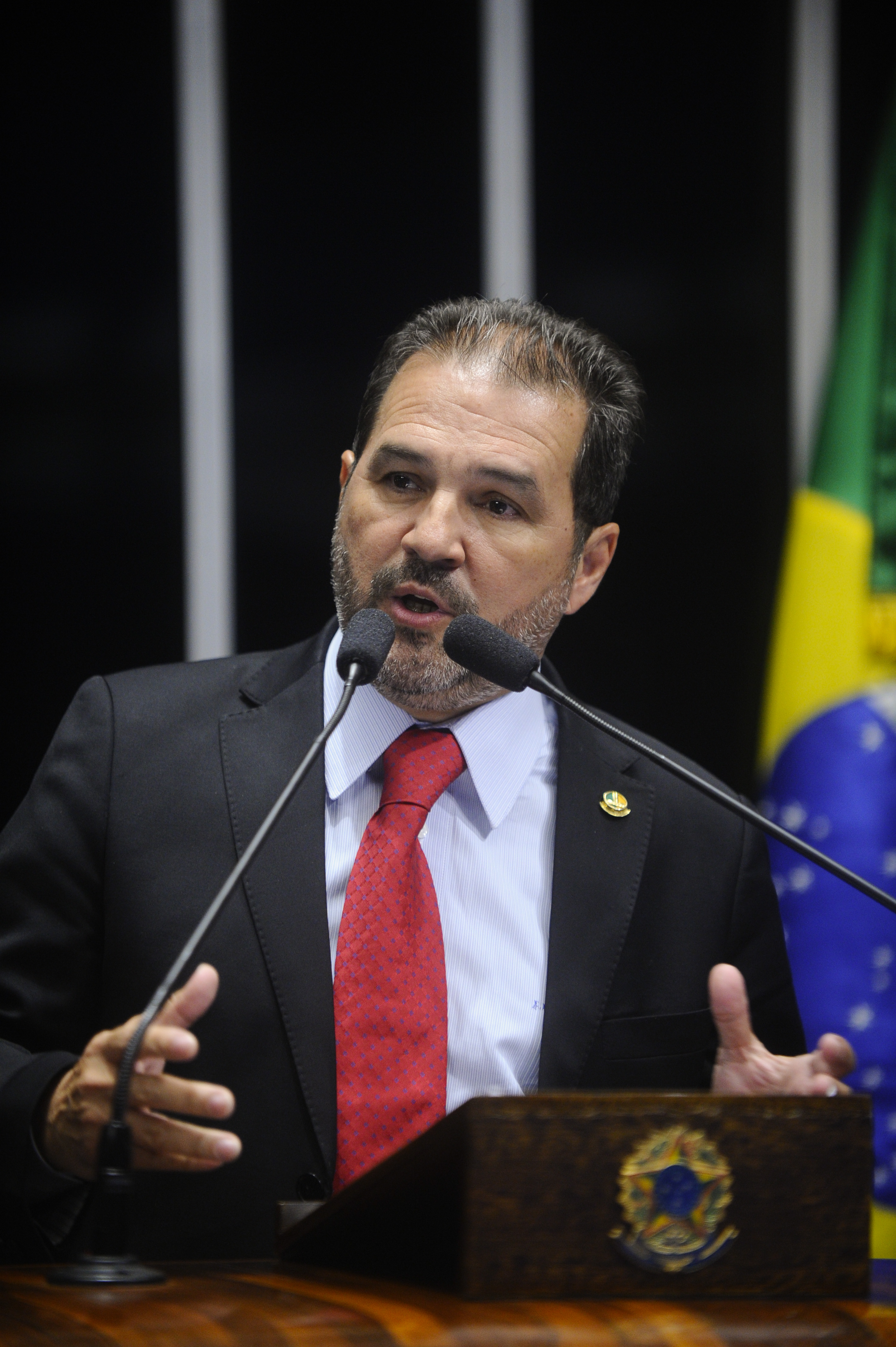 Plenário do Senado durante sessão deliberativa ordinária. Em discurso, senador Eduardo Lopes (PRB-RJ). Foto: Marcos Oliveira/Agência Senado